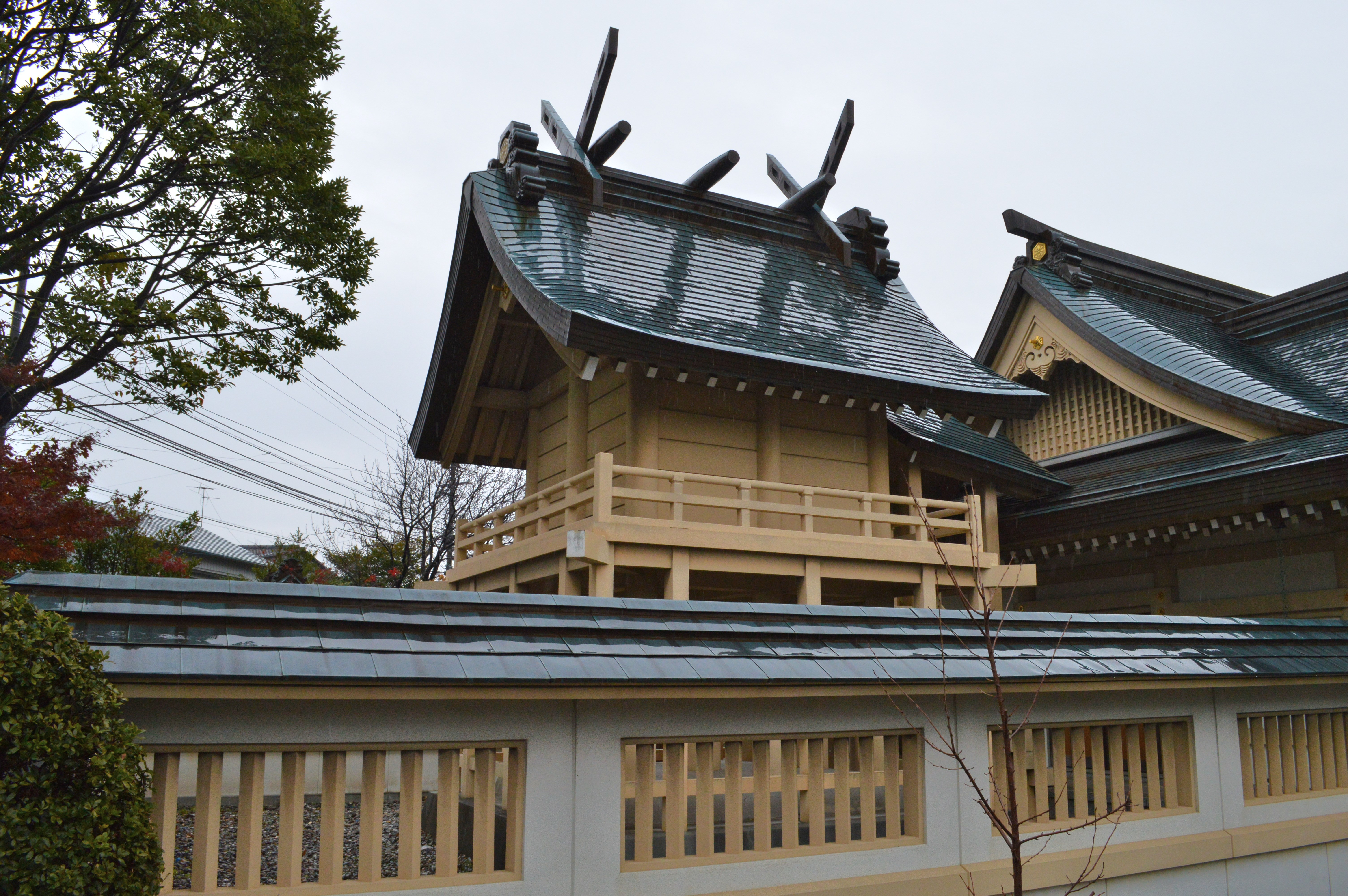 郡頭神社 本殿